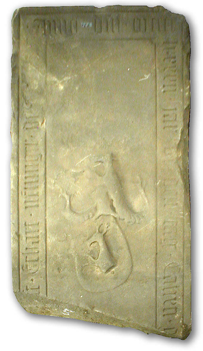 Grabplatte des Heilbronner Bürgermeisters Erhart Nenninger (* in Heilbronn; † 14. Oktober 1492 in Heilbronn)